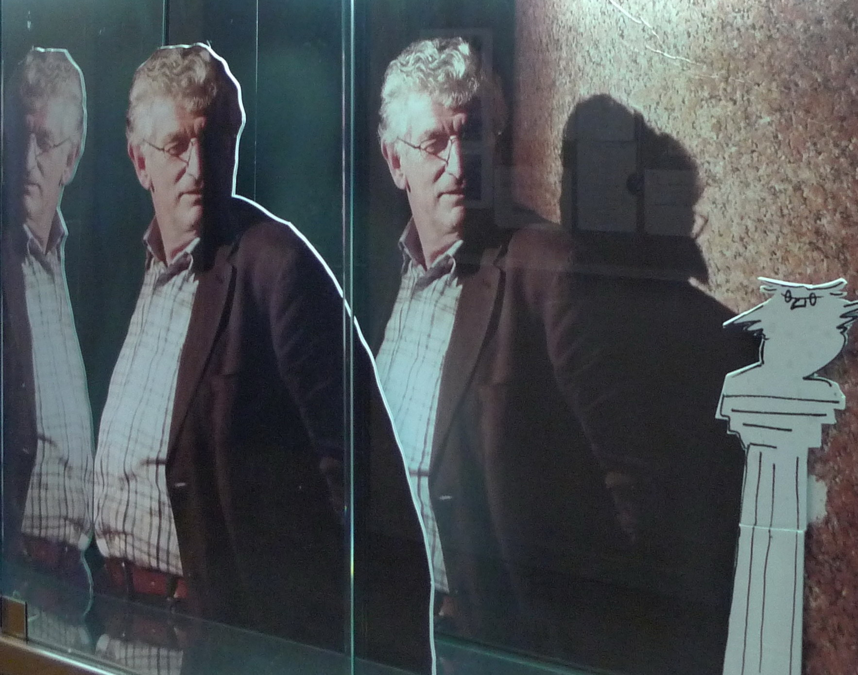 Josef Wilhelm 30.11.2010 Schaukasten 3; eigene Aufnahme des Autors; die schriftliche Genehmigung des Portraitierten zur Veröffentlichung des Bildes liegt dem Autor vor.